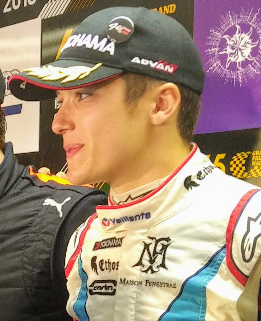 Dan Ticktum consagrado bicampeão do Grande Prémio de Macau de Fórmula 3 Suncity Grupo – Taça do Mundo de F3 da FIA